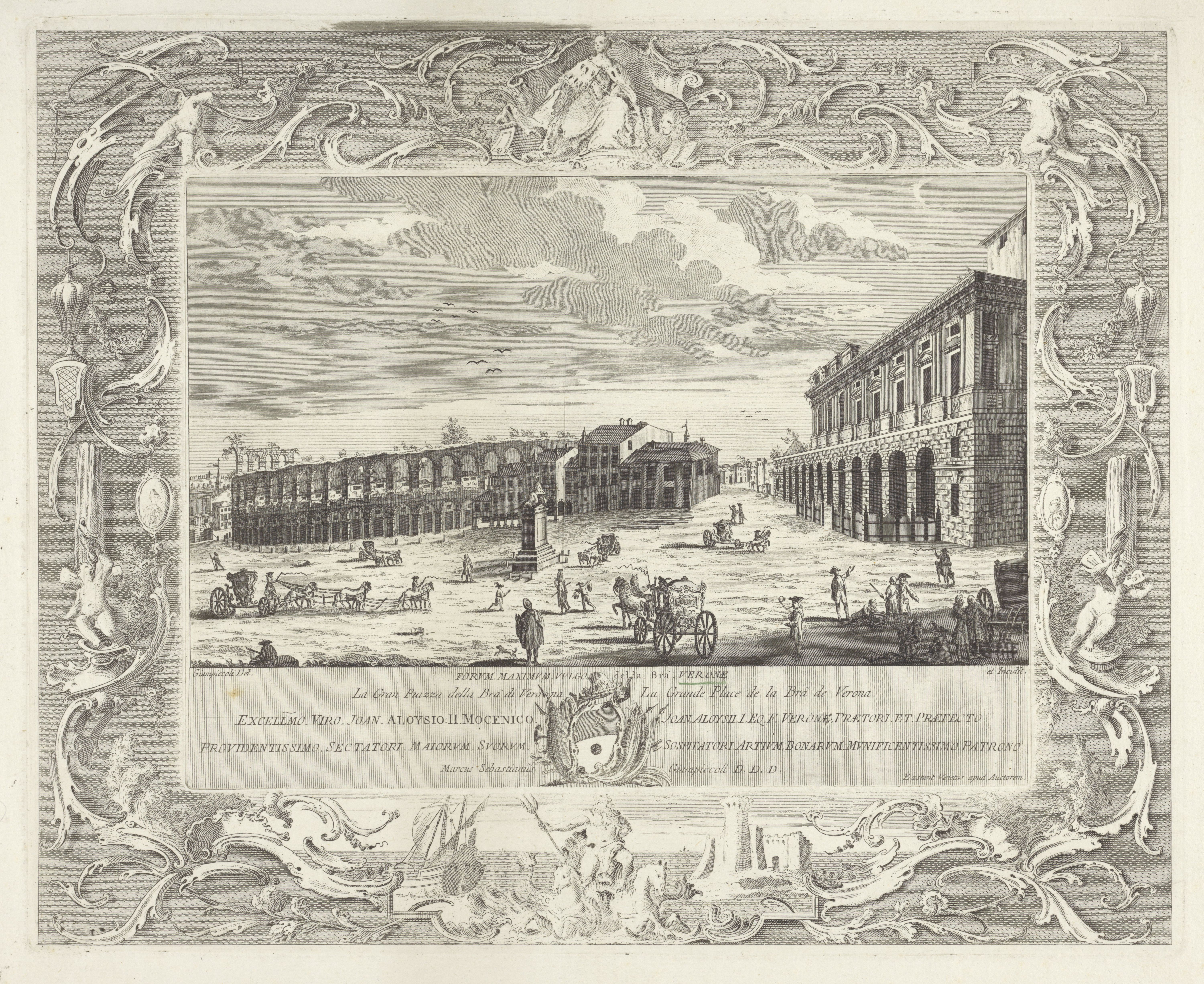 IdentificatieTitel(s): Piazza Bra in VeronaObjecttype: prent Objectnummer: RP-P-1951-922Opschriften / Merken: verzamelaarsmerk, verso, gestempeld: Lugt 2228Omschrijving: Gezicht op Piazza Bra te Verona. Rechts het Palazzo della Gran Guardia. Links de Arena van Verona. Tekst en wapenschild in ondermarge. De voorstelling is gevat in een sierlijst met putti, Neptunus en een tronende vrouwenfiguur met leeuw.VervaardigingVervaardiger: prentmaker: Giuliano Giampiccoli (vermeld op object)naar eigen ontwerp van: Giuliano Giampiccoli (vermeld op object)opgedragen door: Marco Sebastiano Giampiccoli (vermeld op object)opgedragen aan: Joan II Aloysio (vermeld op object)Plaats vervaardiging: prentmaker: Italiënaar eigen ontwerp van: Italiëopgedragen door: VenetiëDatering: 1708 - 1759Fysieke kenmerken: etsMateriaal: papier Techniek: etsenAfmetingen: plaatrand: h 358 mm × b 441 mmOnderwerpWat: stadsgezichten en landschappen met bouwsels van mensenlandscape with ruins - II - ideal landscapesWaar: VeronaArena van VeronaPiazza BraPalazzo della Gran GuardiaVerwerving en rechtenCredit line: Aankoop uit het F.G. Waller-FondsVerwerving: aankoop 1951Copyright: Publiek domein